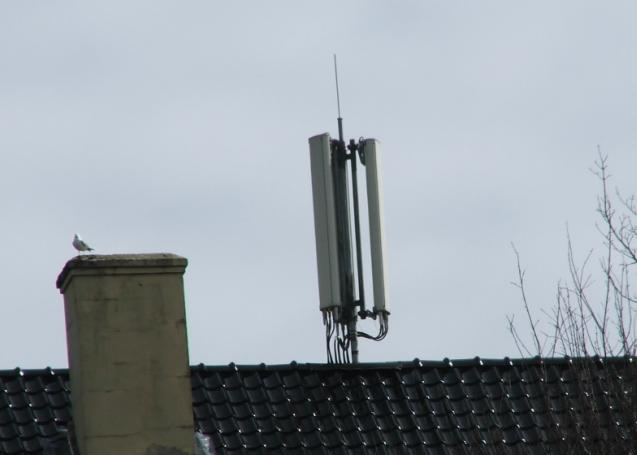 GSM Antenne